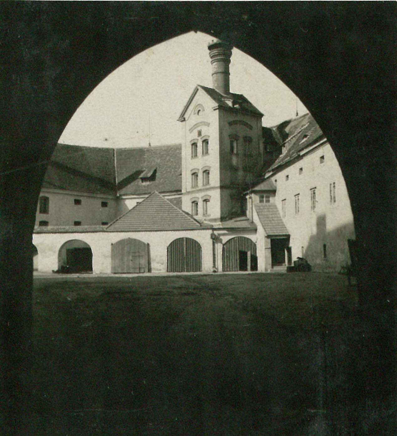 Pohled z od hlavního vstupu pod branou zámku Rožmitál na dřívější část pivovaru. Přístavba z poloviny 19. století včetně hvozdové věže byla zbourána v roce 1980 během generální rekonstrukce.